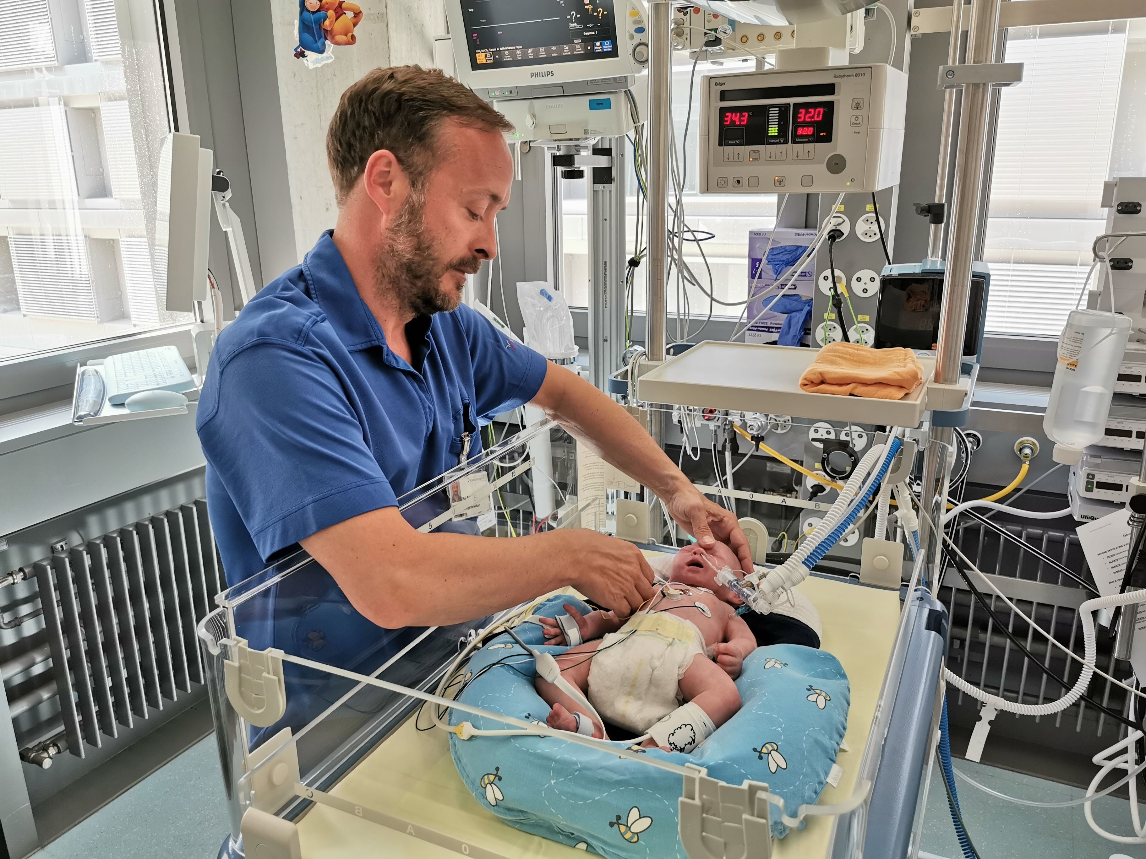 An einem Baby Lungensimulator (LuSi, neosim AG) wird die Einstellung der Beatmung trainiert.